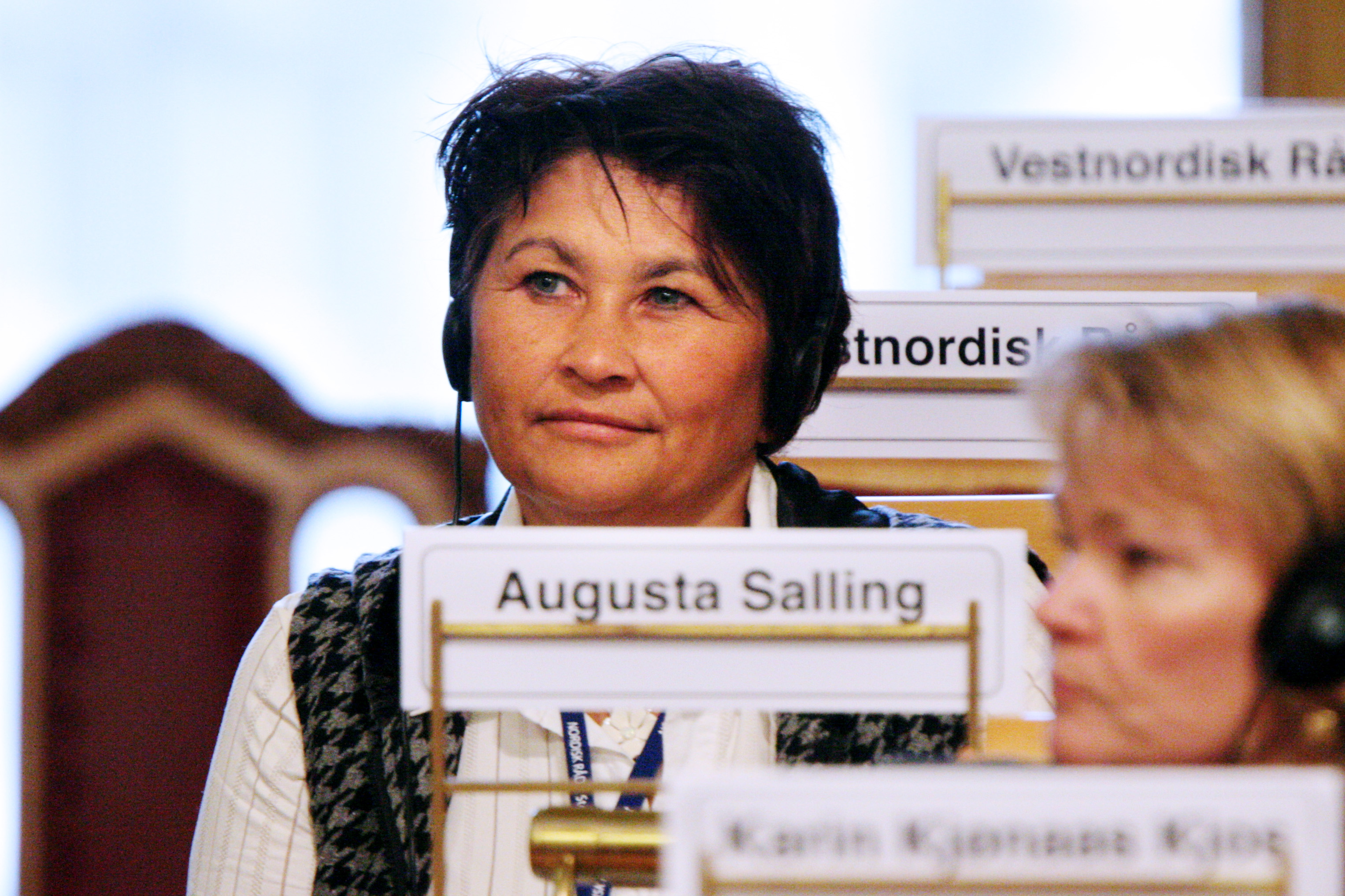 Augusta Salling vid Nordiska Rådets session i Oslo. 2007-10-31. Foto: Magnus Fröderberg/norden.org